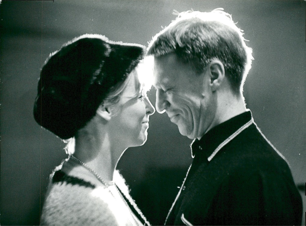 Barbro Larsson och :sv:Anders Ek]|Anders Ek på Dramaten. Kollationering av "Flickan i Montreal".